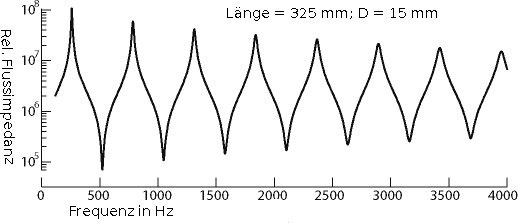 Akustische Flussimpedanz eines dünnen Rohres als Funktion der Frequenz selbst gezeichnet